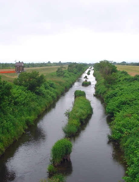 北海道・札幌市南区・清田区・厚別区・白石区・江別市を流れる厚別川。米里付近。